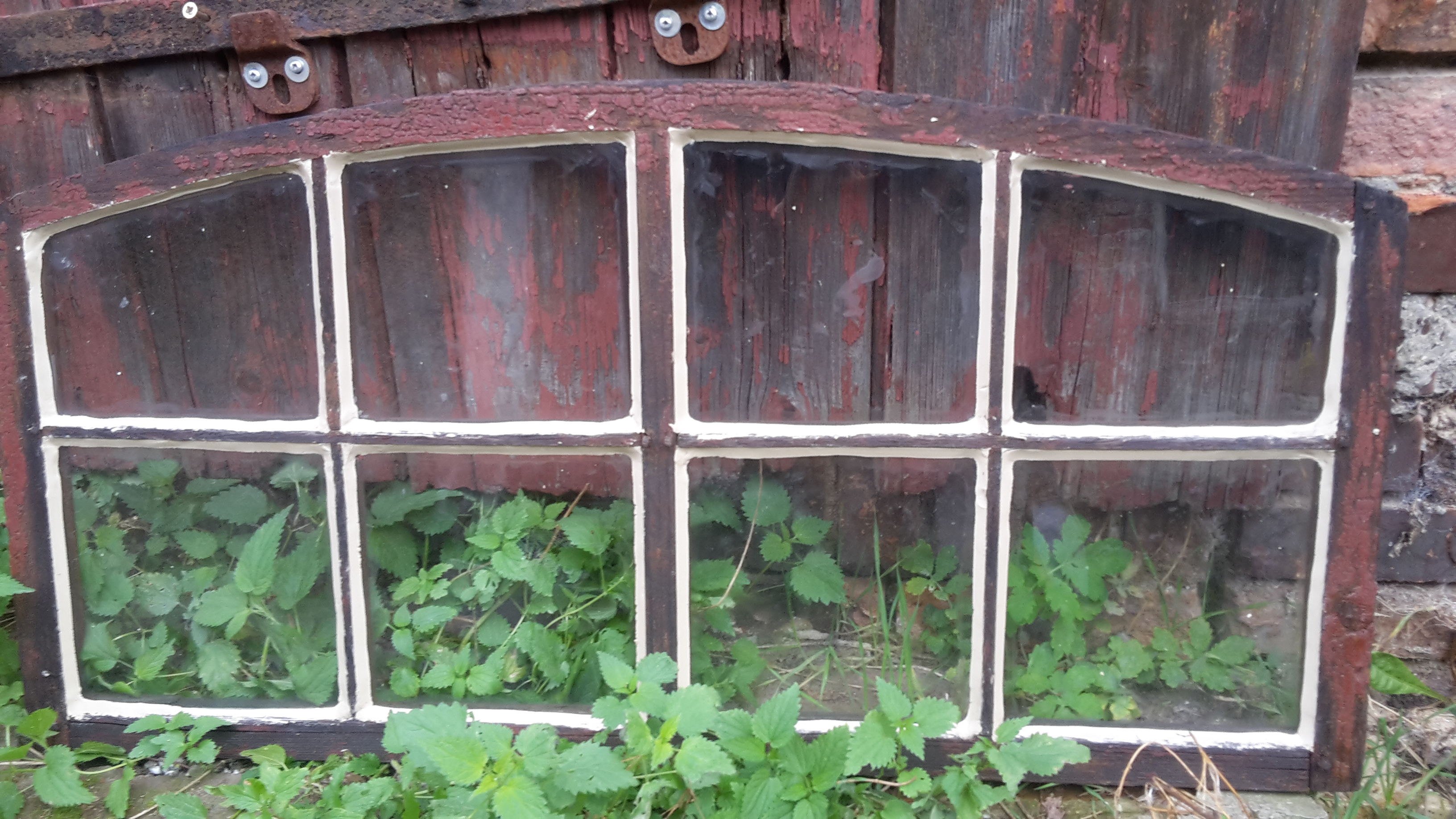 Eingekittetes Fenster mit klassischem Leinölfensterkitt.